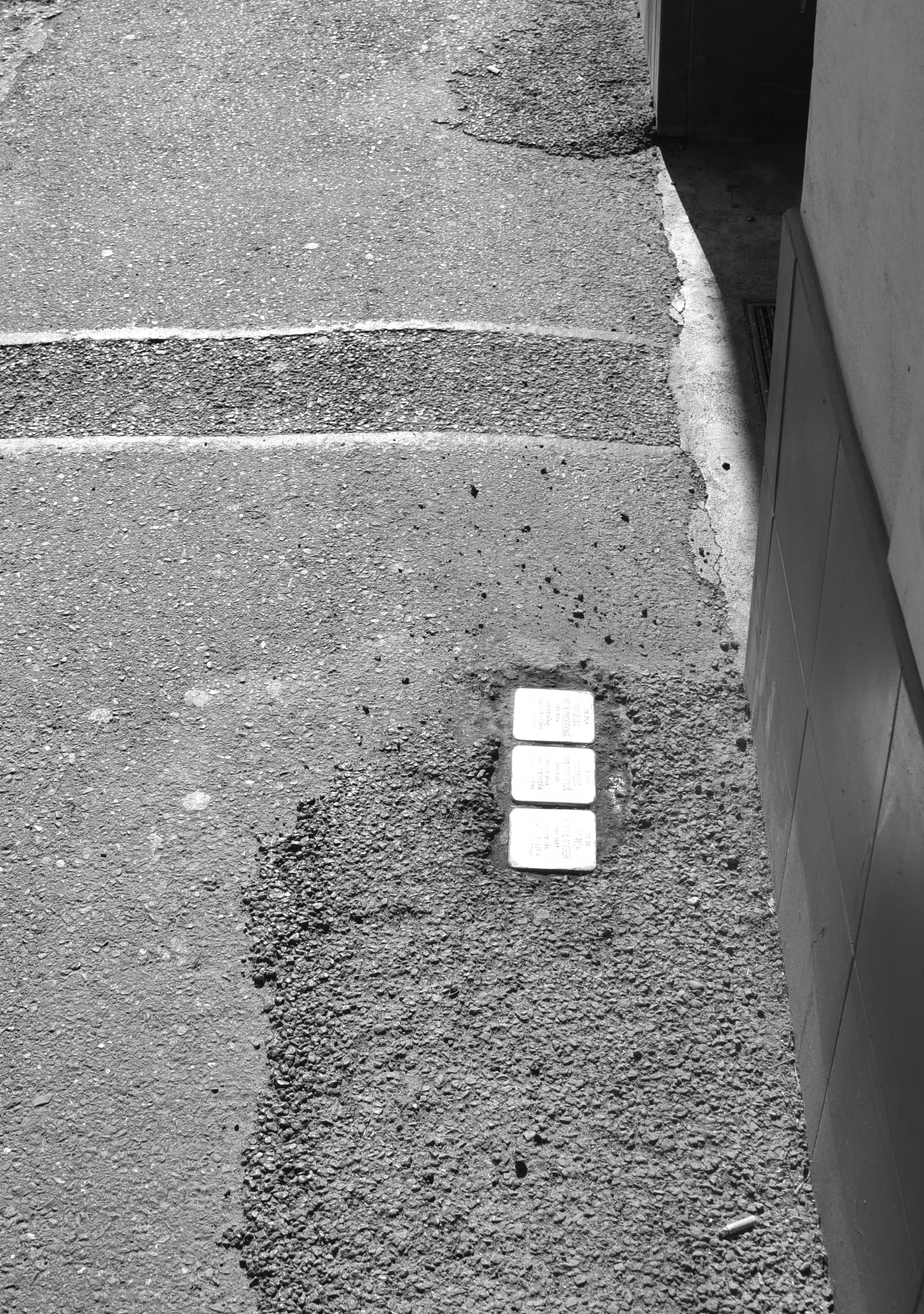 Stolpersteine für Auguste und Friedländer und Matylda Mautnerova in Prag-Michle, Michelská 792/2.